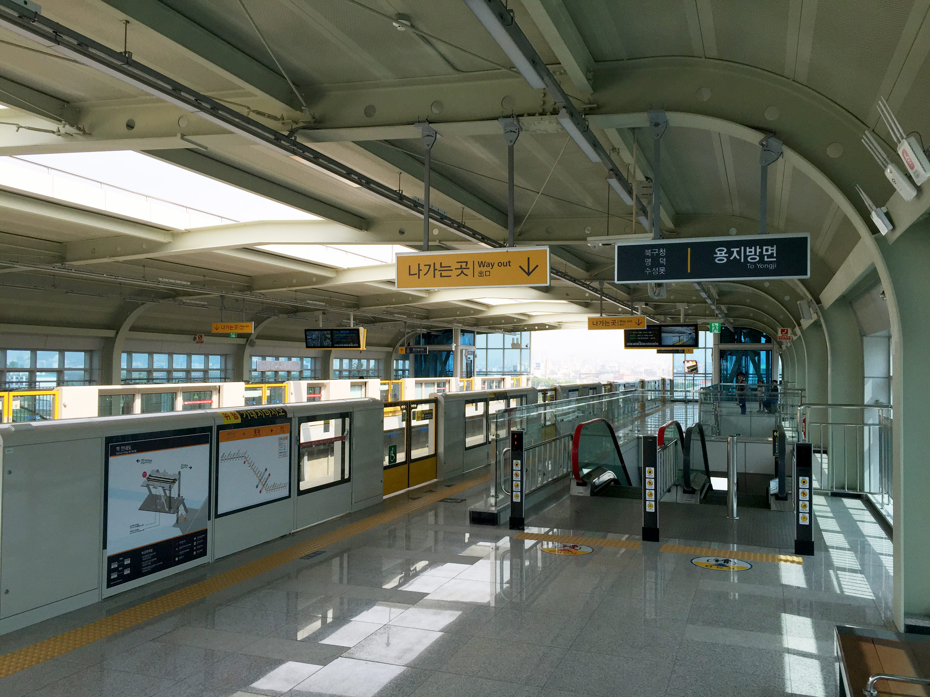 팔달역 승강장